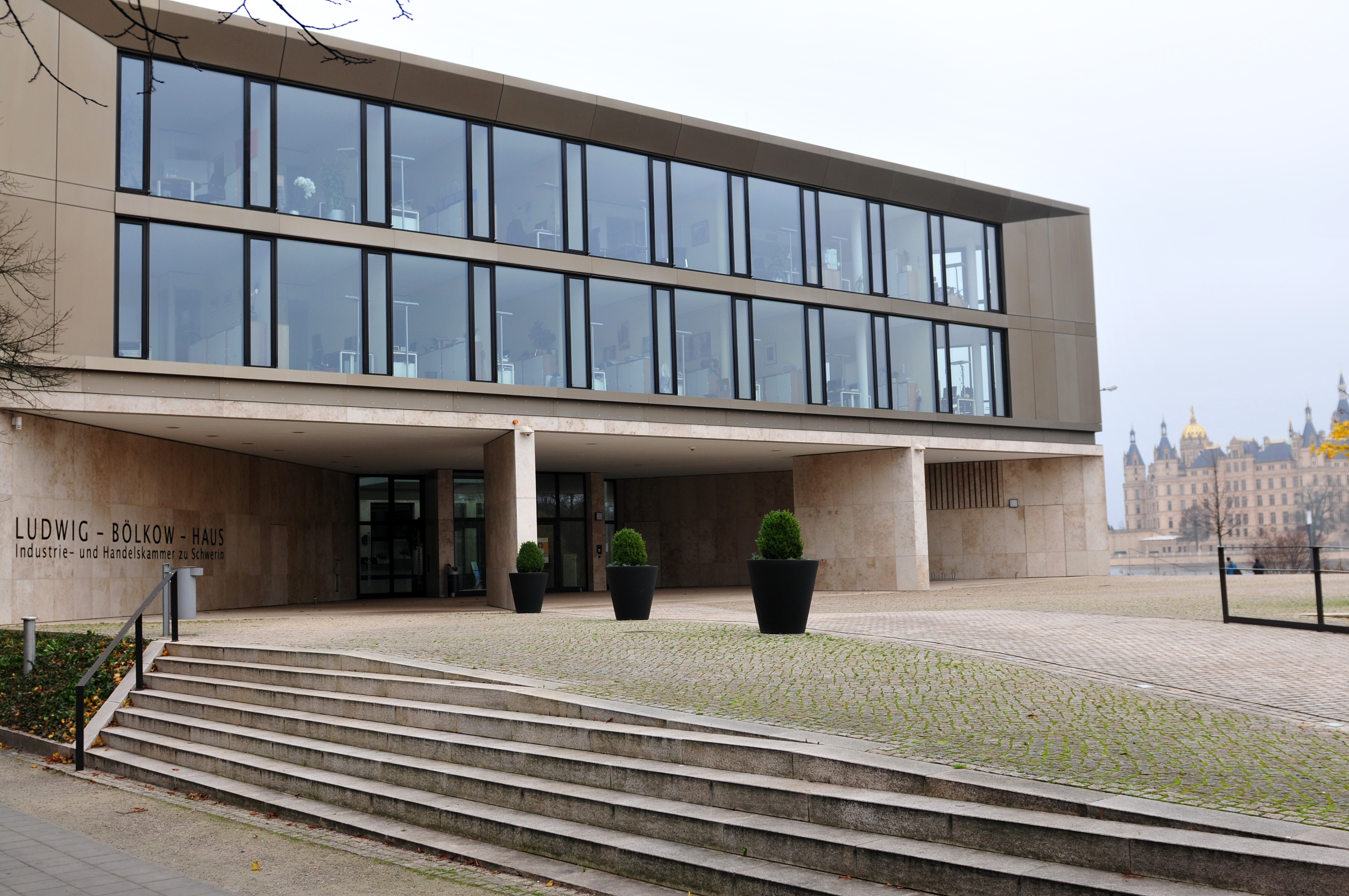 Schwerin